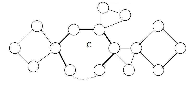 Chu trình Euler trong (G)